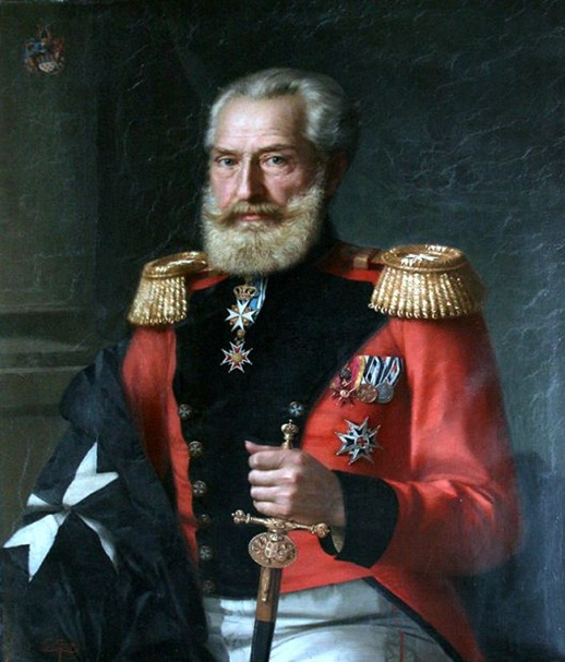 Ölgemälde von Franz Thöne aus dem Jahr 1888 . Hermann Freiherr von und zu Brenken